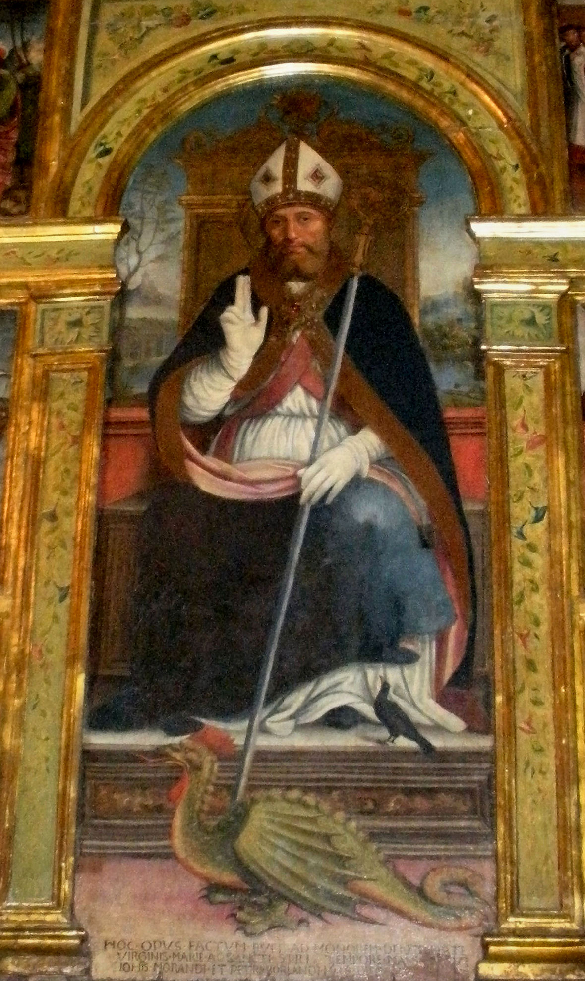 Chiesa di San Siro di Struppa, Genova. Pannello centrale del polittico raffigurante episodi dell'agiografia di San Siro, vescovo di Genova, con l'immagine del santo che scaccia il basilisco